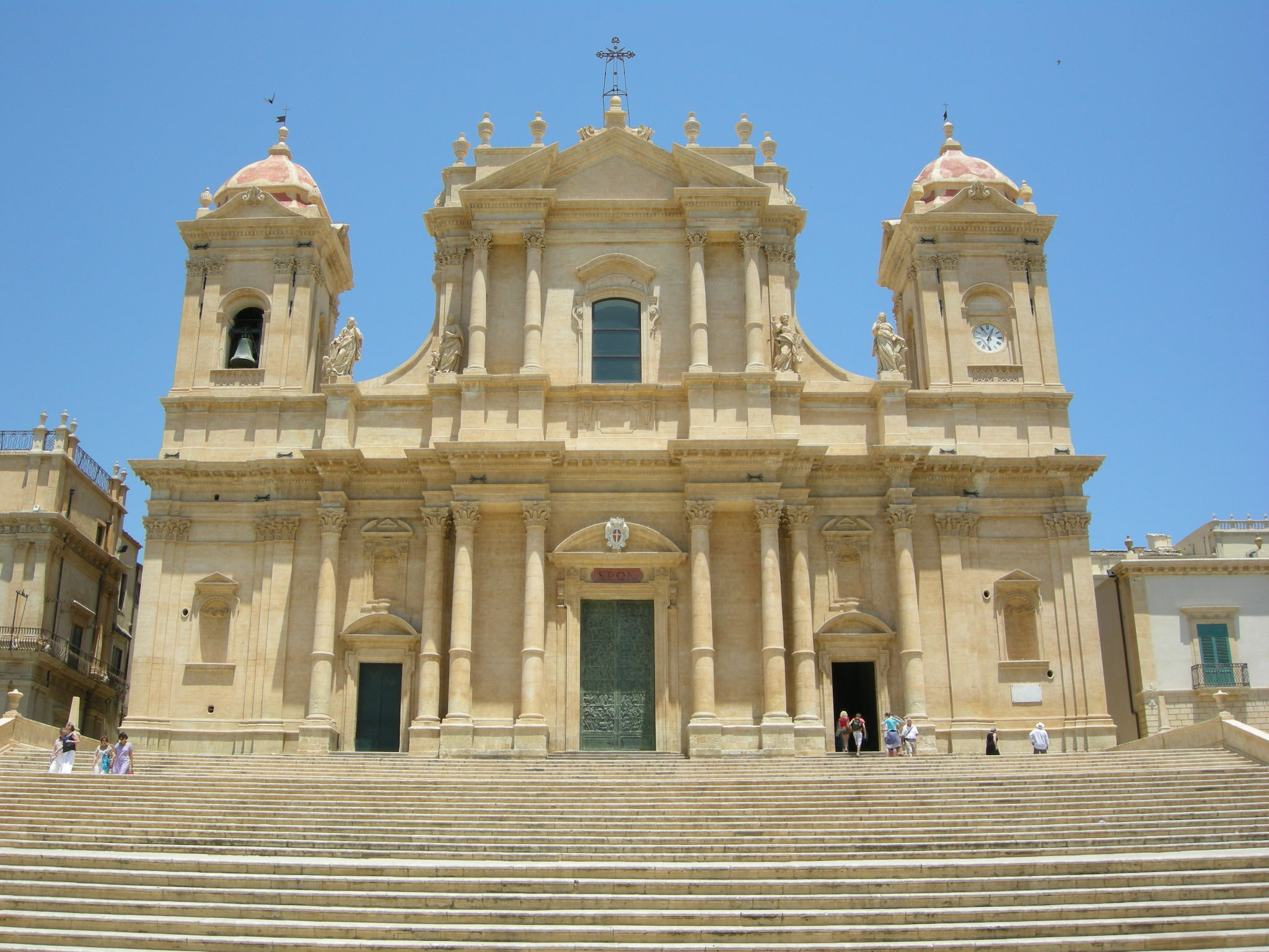 Noto, duomo, facciata